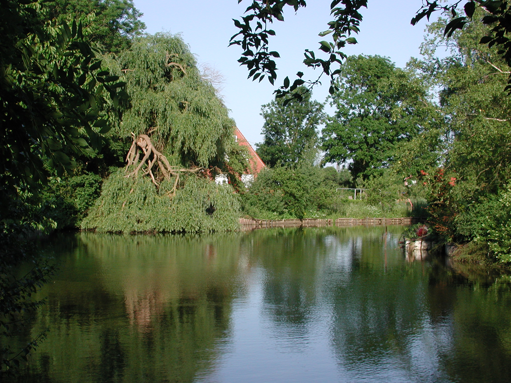 Idyllische Wohngegend am Wolthuser Kolk in Emden. Das Gewässer war früher Teil des Flusses Ehe.